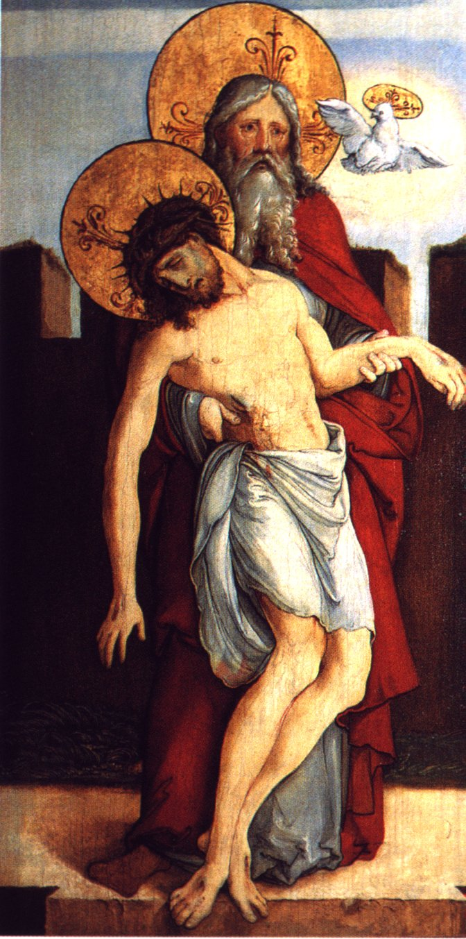 Ausstattung der ehemaligen Seitenaltäre der Meßkircher St. Martinskirche, Standflügel: Heilige Dreifaltigkeit Eingescannt aus: Anna Moraht-Fromm und Hans Westhoff: Der Meister von Meßkirch – Forschungen zur südwestdeutschen Malerei des 16. Jahrhunderts, Ulm, 1997, S. 172 links